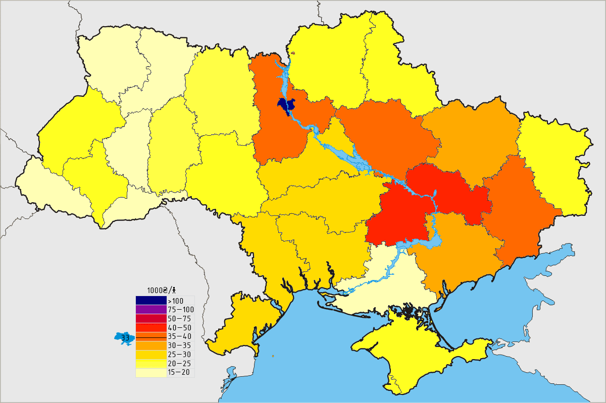 2013 г.